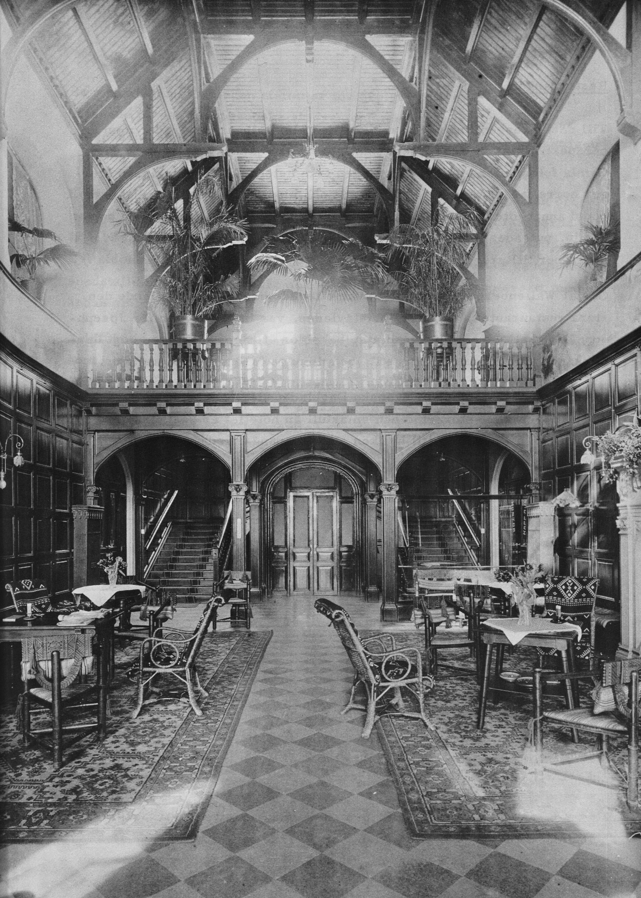 Grand Hotel, Saltsjöbaden, Stora salen